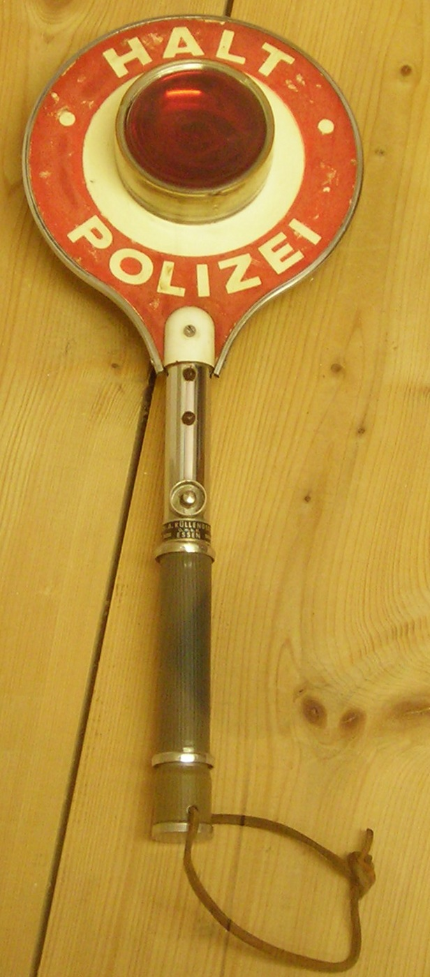 Historische Winkerkelle der Bayerischen Polizei (ca. 1970), vermutlich bundesweit einheitlich (Exponat der Sonderausstellung 60 Jahre Bayerische Polizei in Ingolstadt)